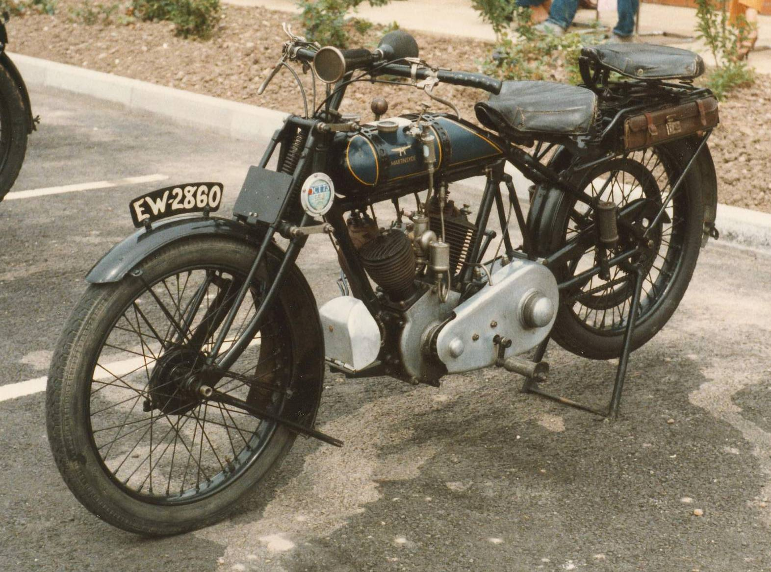 Martinsyde motorcycle, 1922, model C, 498cc